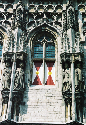 Description deel voorgevel stadhuis Middelburg GFDL deel voorgevel stadhuis Middelburg